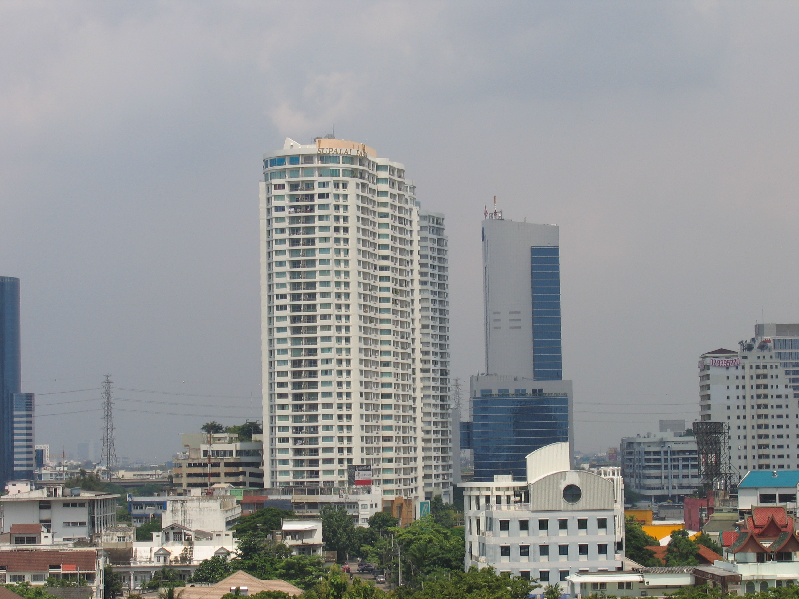 Supalai Park Towers